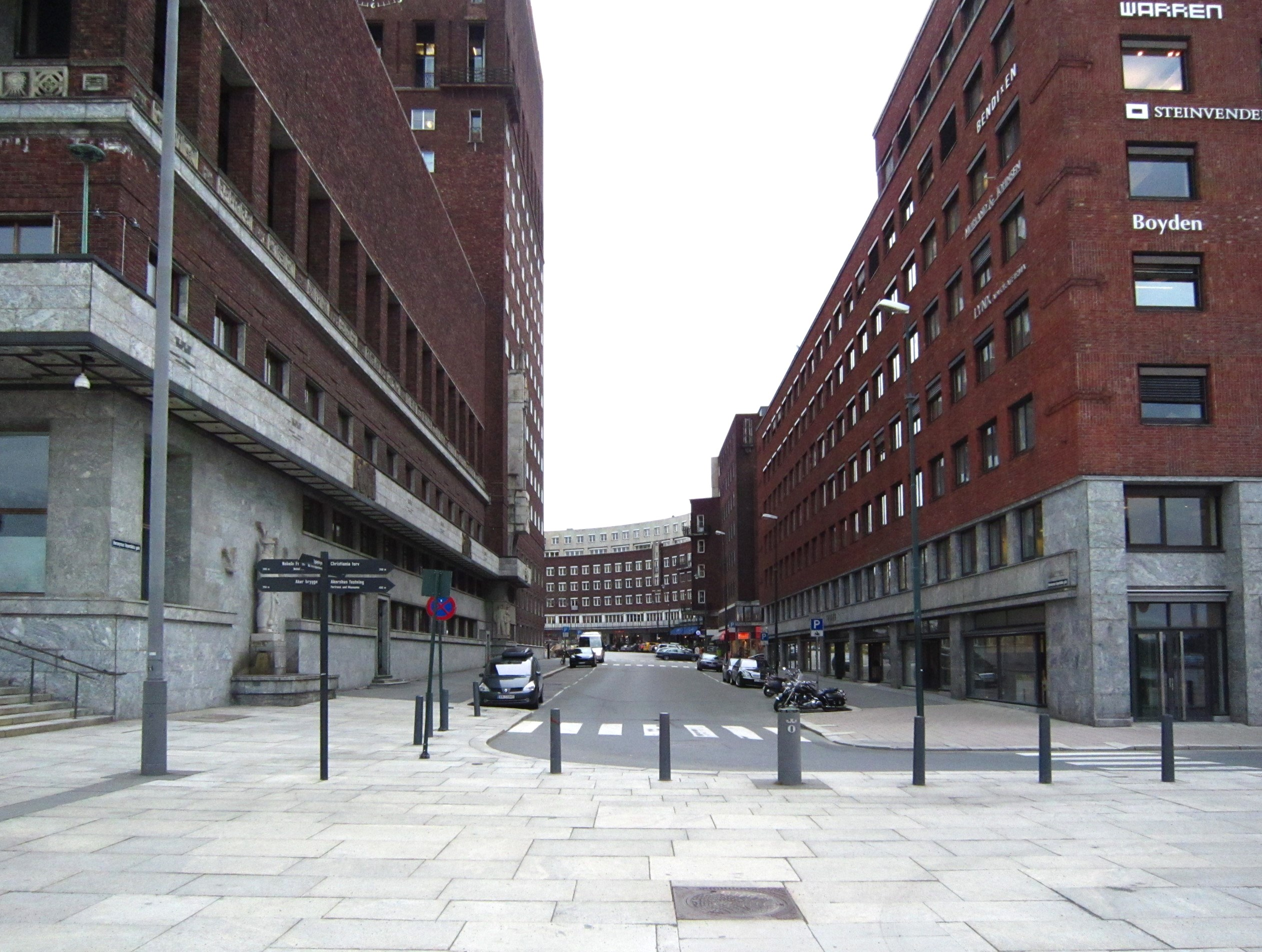 Hieronymus Heyerdahls gate, øst for Oslo rådhus